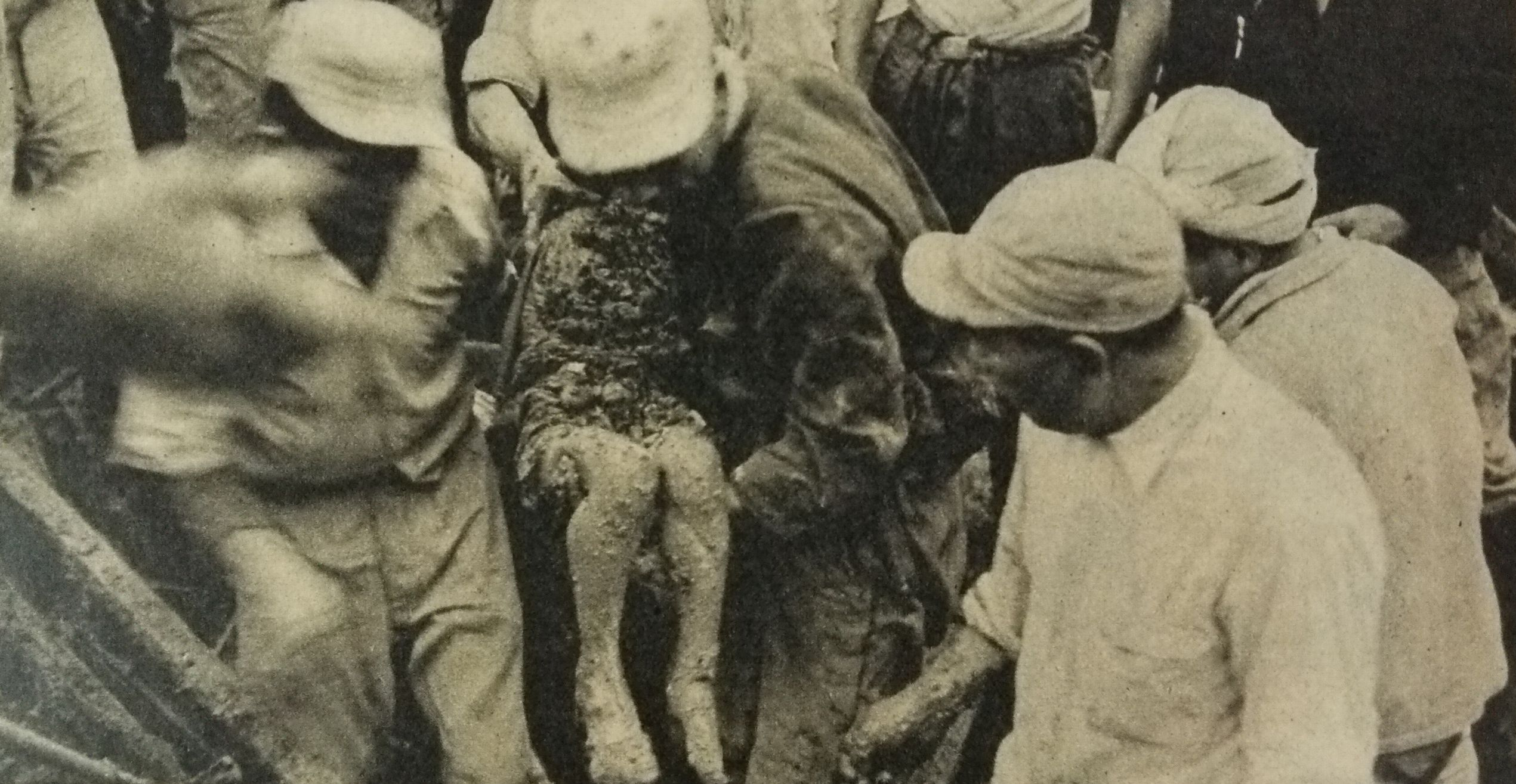 昭和28年西日本水害の際、土砂崩れの下から救出された少女（福岡県門司市白木崎）